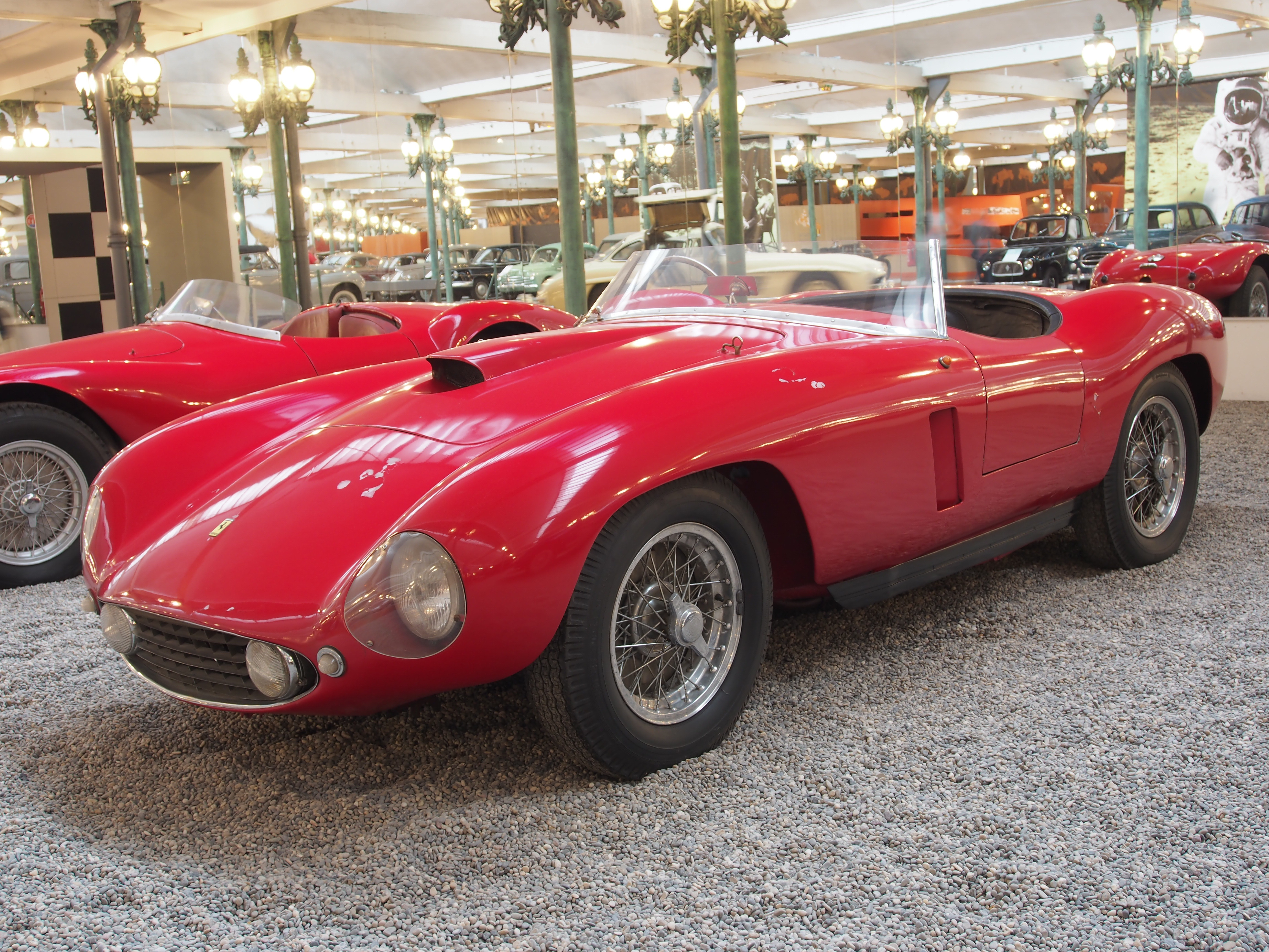 Photographed at the Cité de l’Automobile, Musée national de l’automobile, Collection Schlumpf, Mulhouse, France.